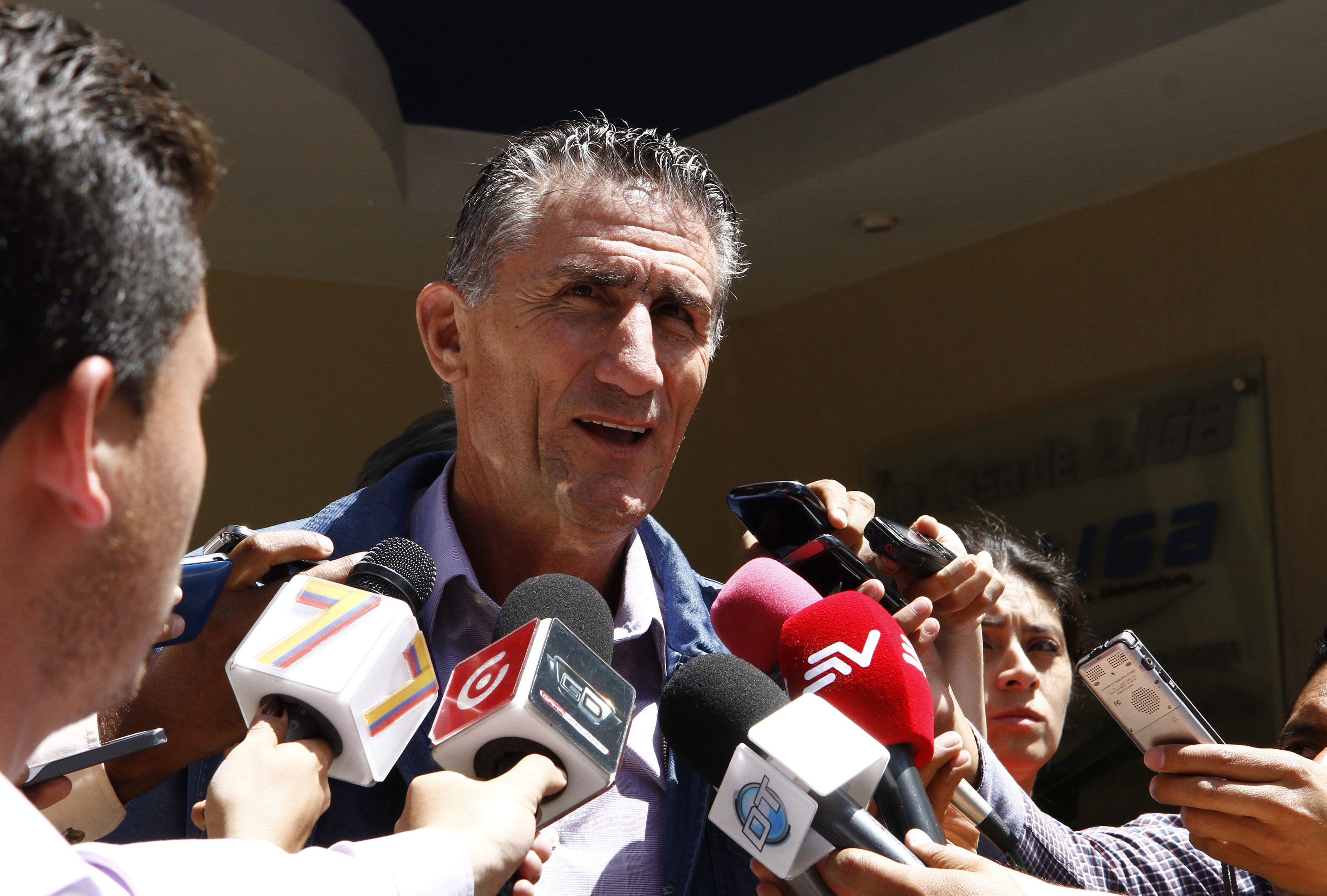 Quito, Ecuador, 07 ene (ANDES).- Edgardo Bauza, Técnico del San Lorenzo visitó al equipo ecuatoriano LDU de Quito.